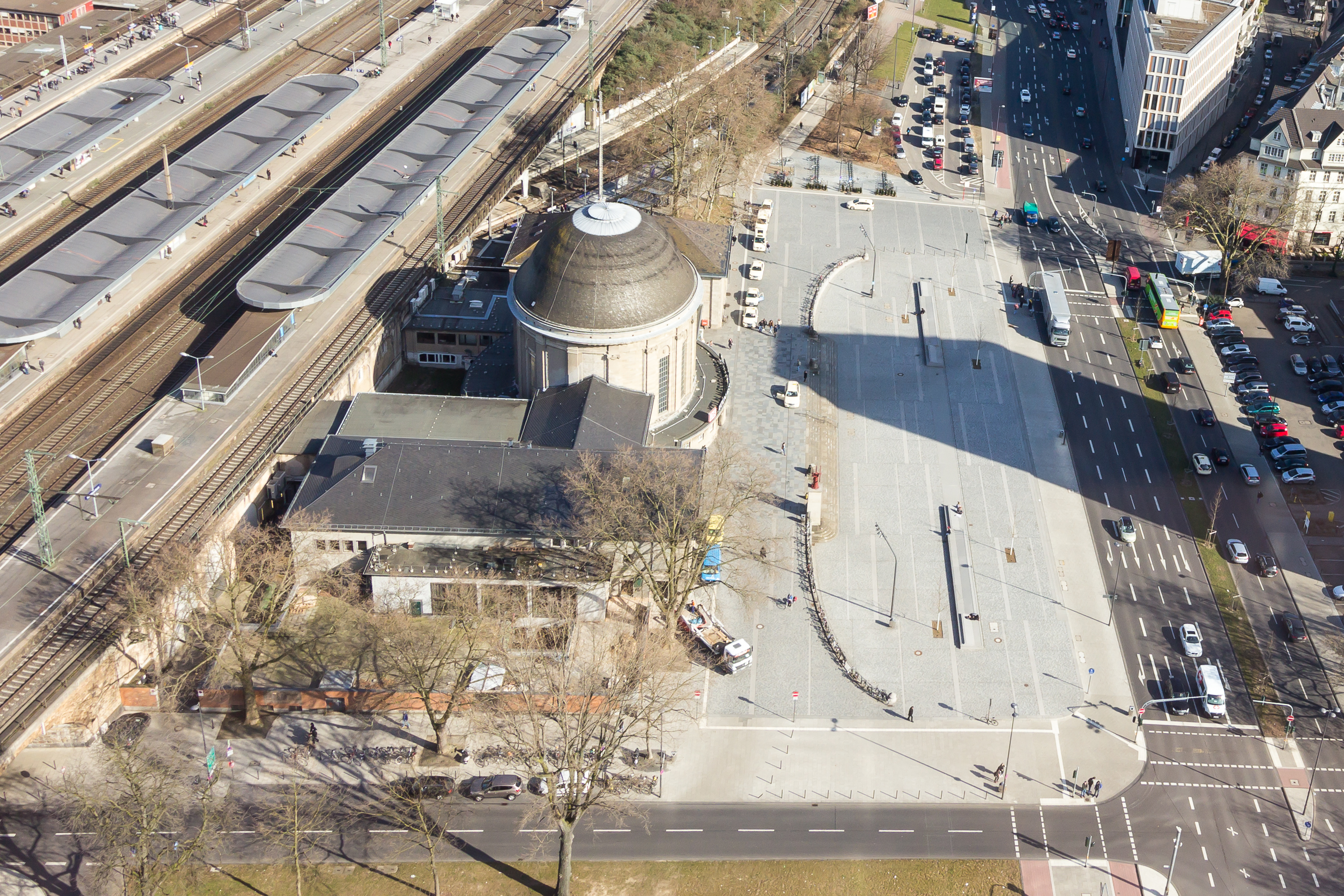 Bahnhof Köln Messe/Deutz mit dem 2014 neu gestalteten Bahnhofsvorplatz (Ottoplatz). Blick vom KölnTriangle